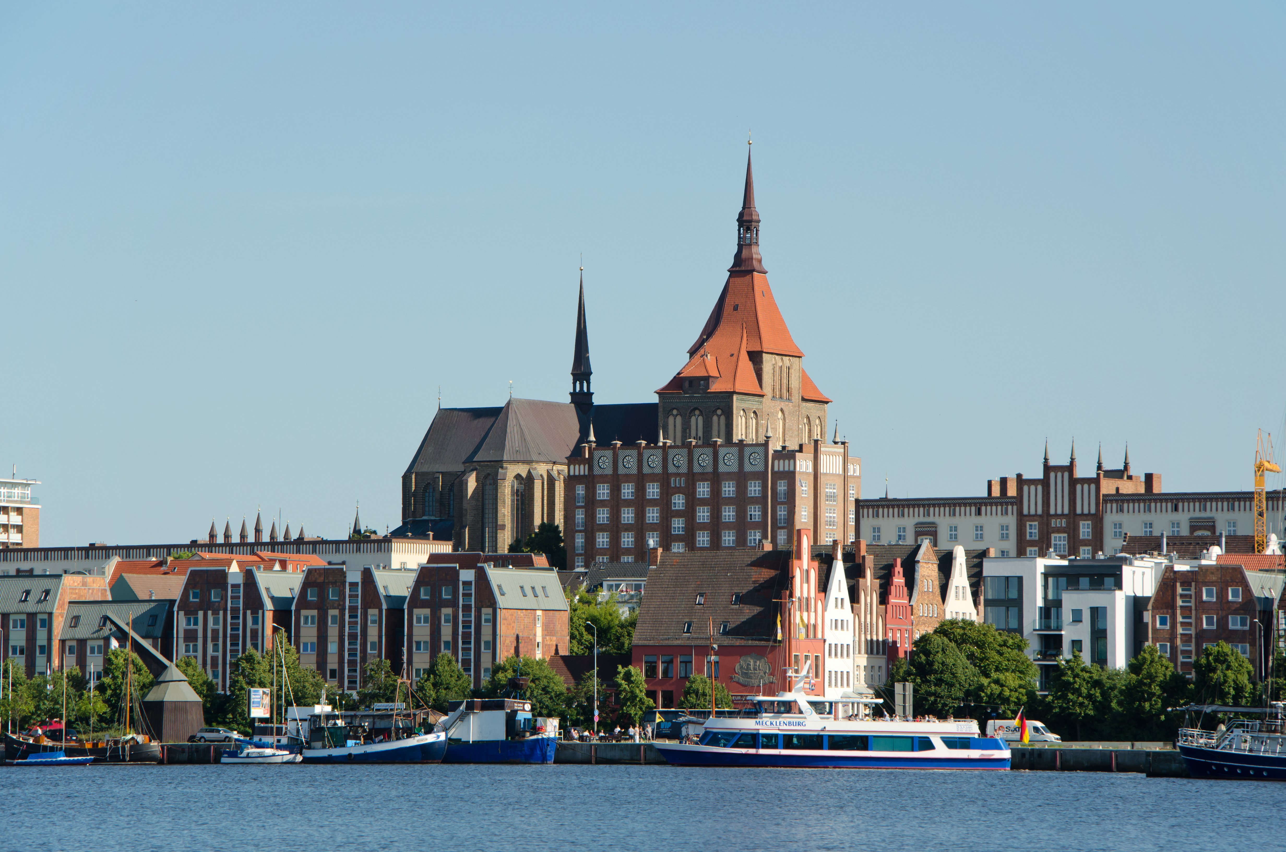 Rostock nördliche Altstadt mit der Marienkirche vom gegenüberliegenden Warnowufer gesehen